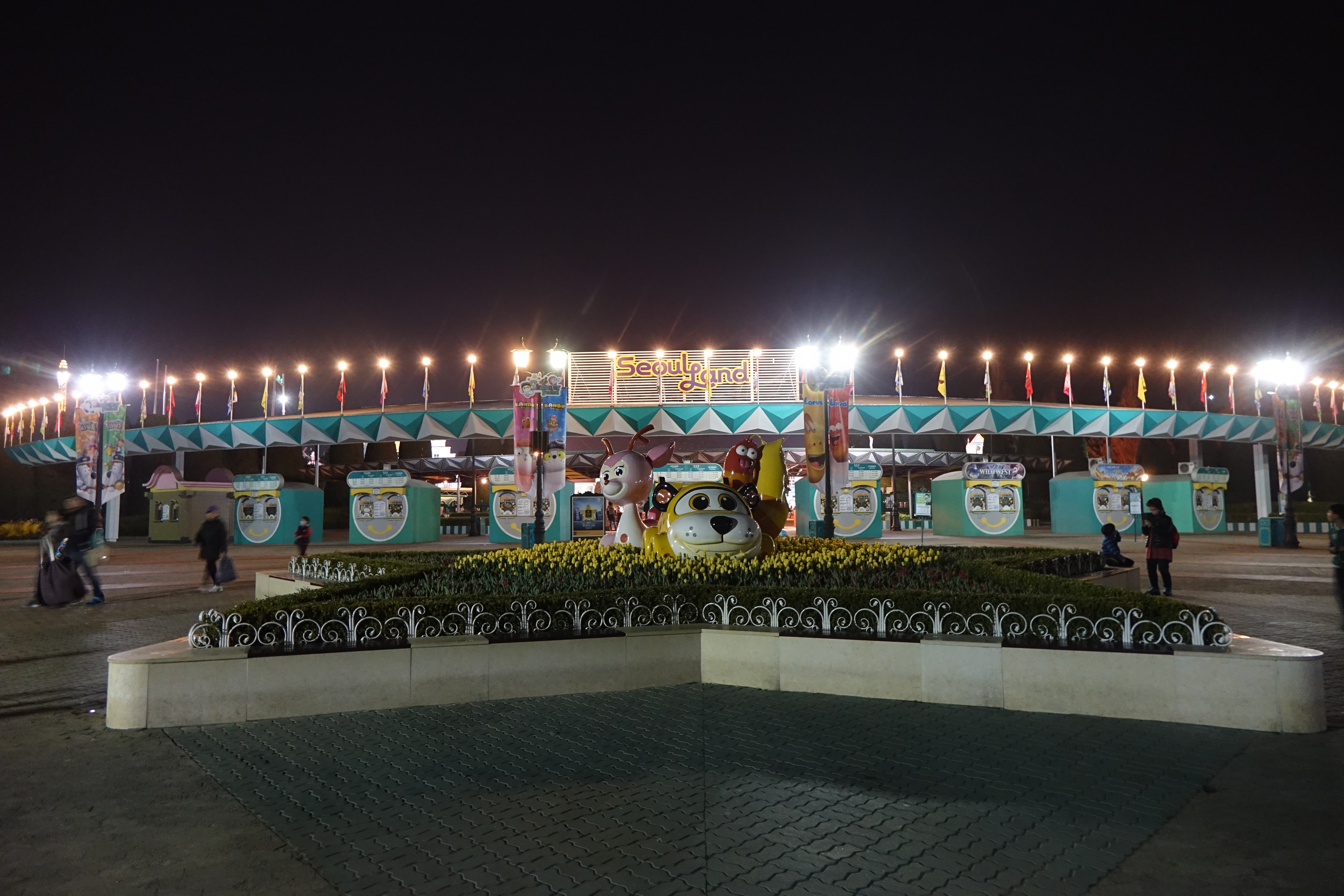 본 사진을 퍼블릭 도메인으로 배포합니다. 2015년 3월 31일. 최광모.